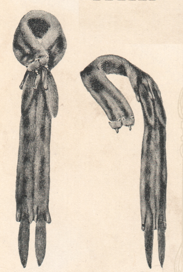 Modebilder 1908/1909 (Ausschnitt) Nr. 42. a. b. Amerik. Zobelstola. Von H. Peter, Augsburg